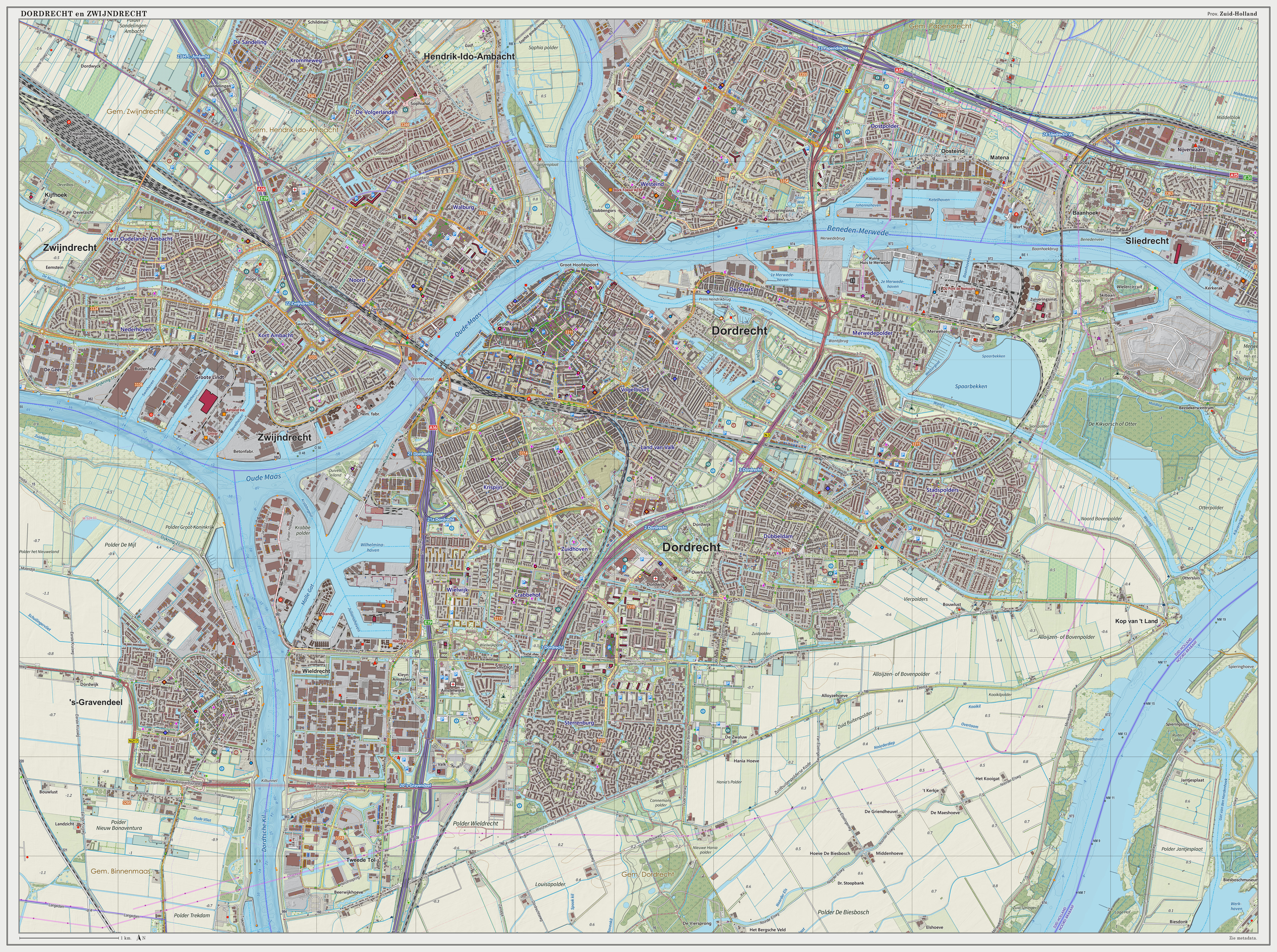 Topografische kaart van Dordrecht (woonplaats). Resolutie: 300 pixels/km. Kaartbeeld samengesteld uit de open geodata van de Top10NL en Top25namen (Basisregistratie Topografie, Kadaster), Creative Commons BY licentie. Gebouwvlakken uit open geodata BAG extract. Wegen uit de OpenStreetMap. Reliëfschaduw uit de Actuele Hoogtekaart AHN2. Samenstelling en kleurenschema: Jan-Willem van Aalst, met QGIS2. Zie ook de Legenda.